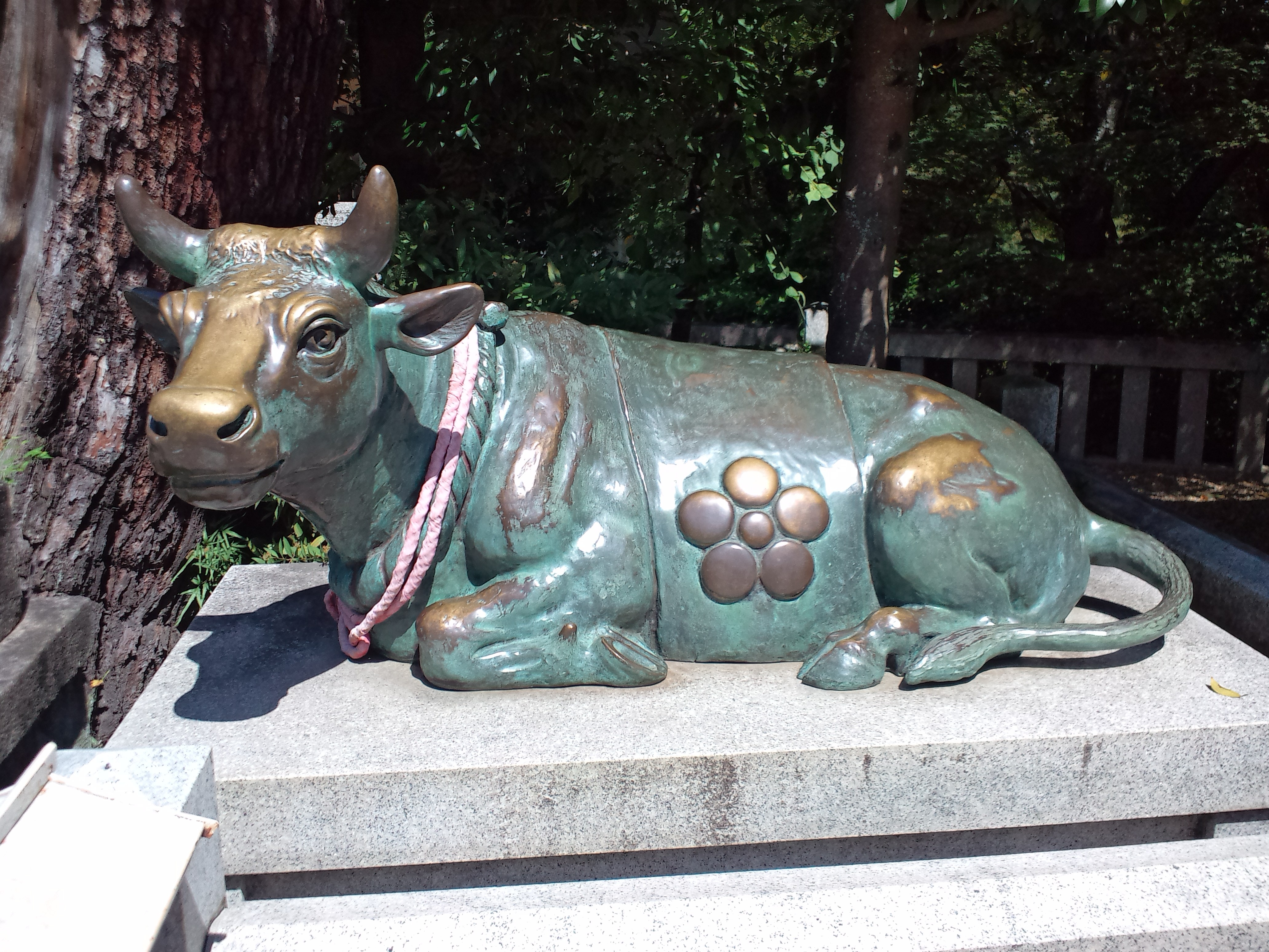 長岡天満宮 神牛像